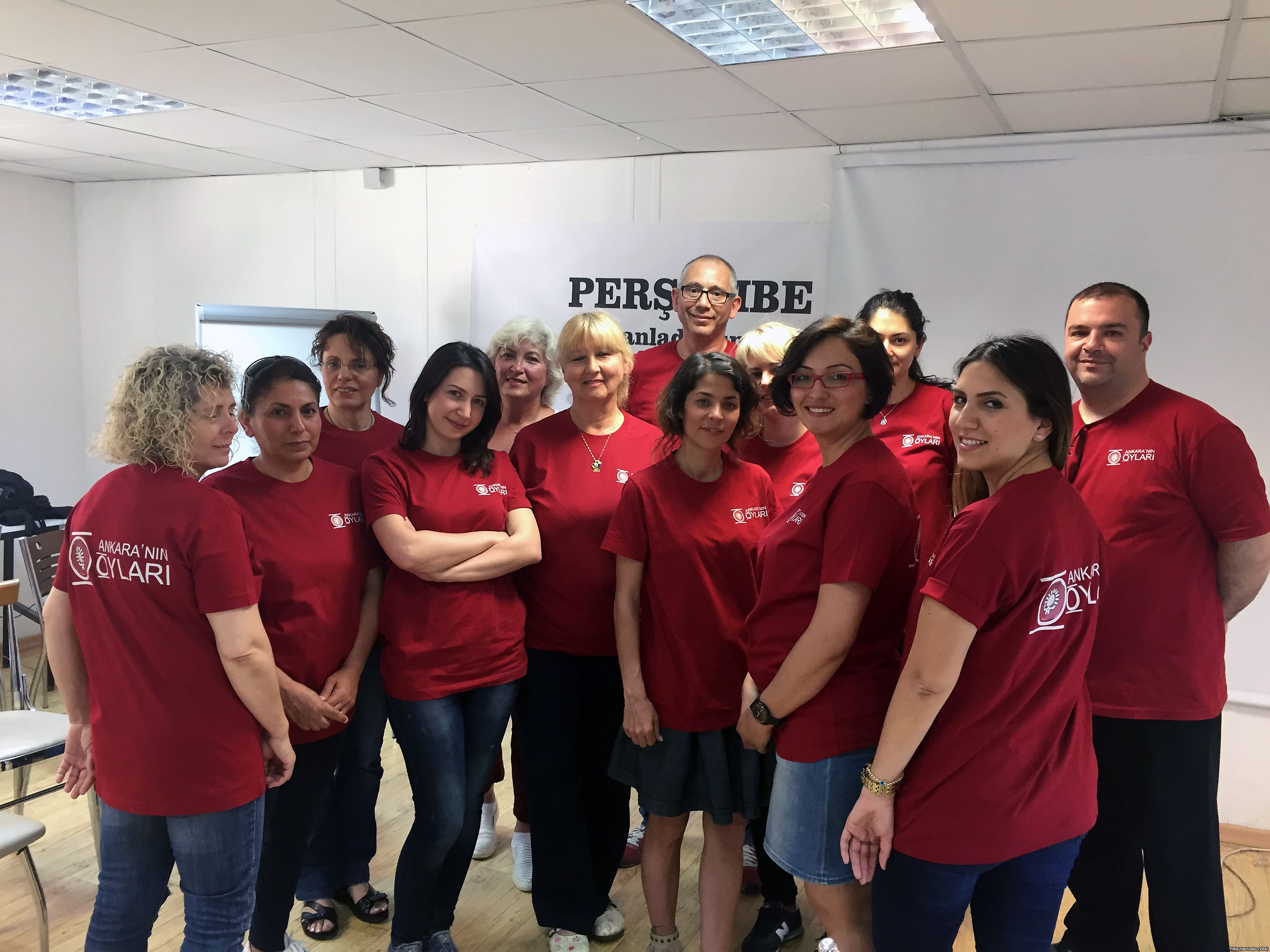 Seçim sandıklarında gözlemcilik yapan gönüllü Ankara'nın Oyları topluluğu.